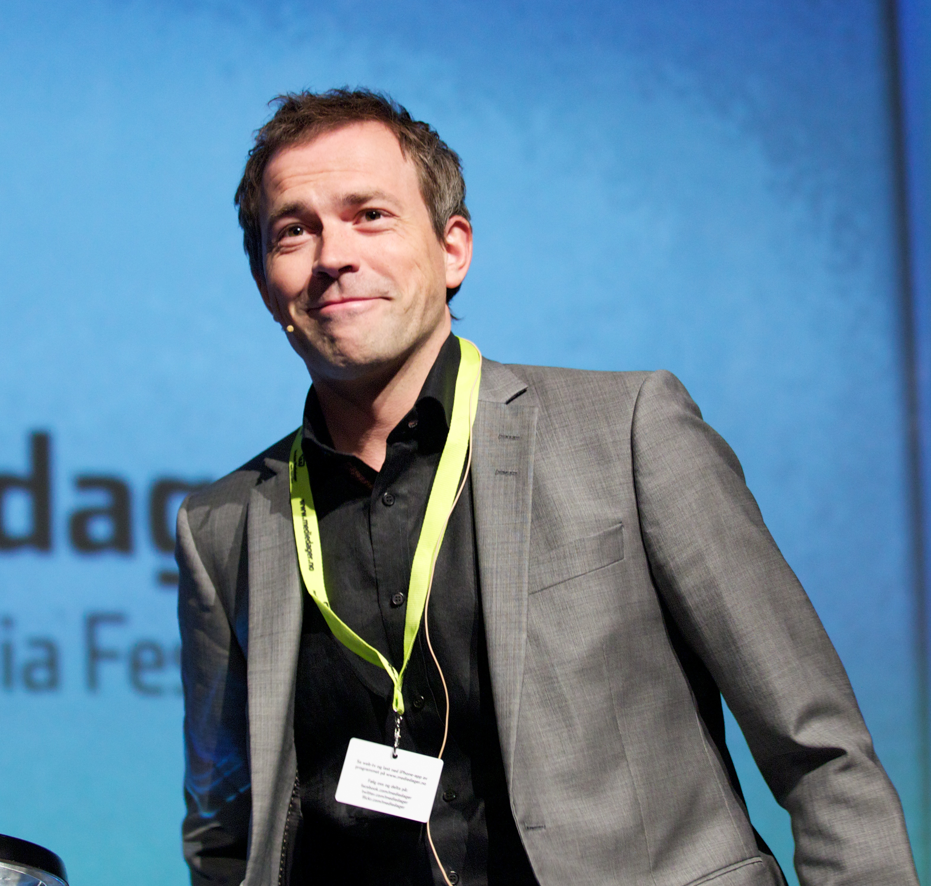 PR i praksis.